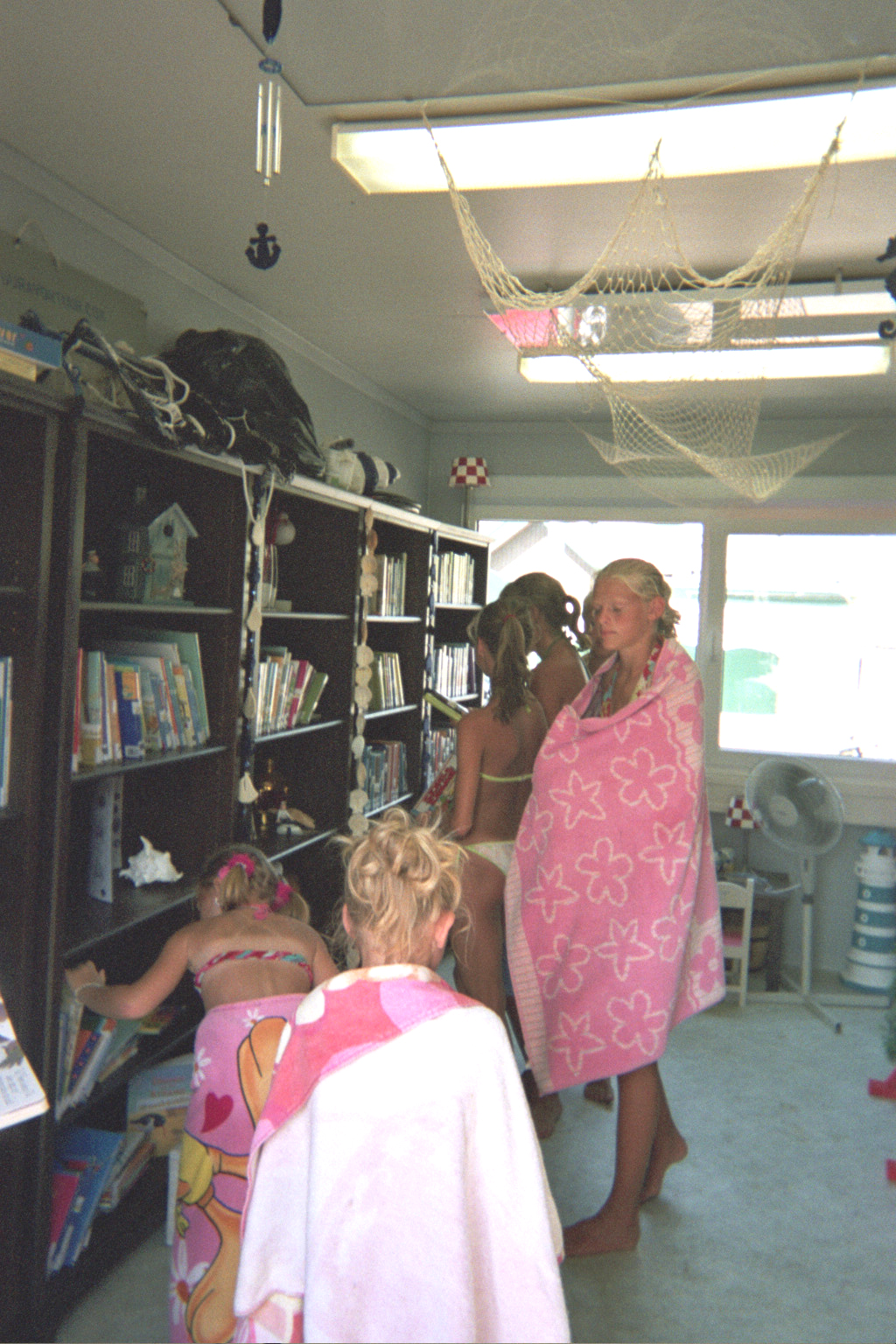 Strandbibliotheek op het strand van Katwijk in de zomer van 2006.